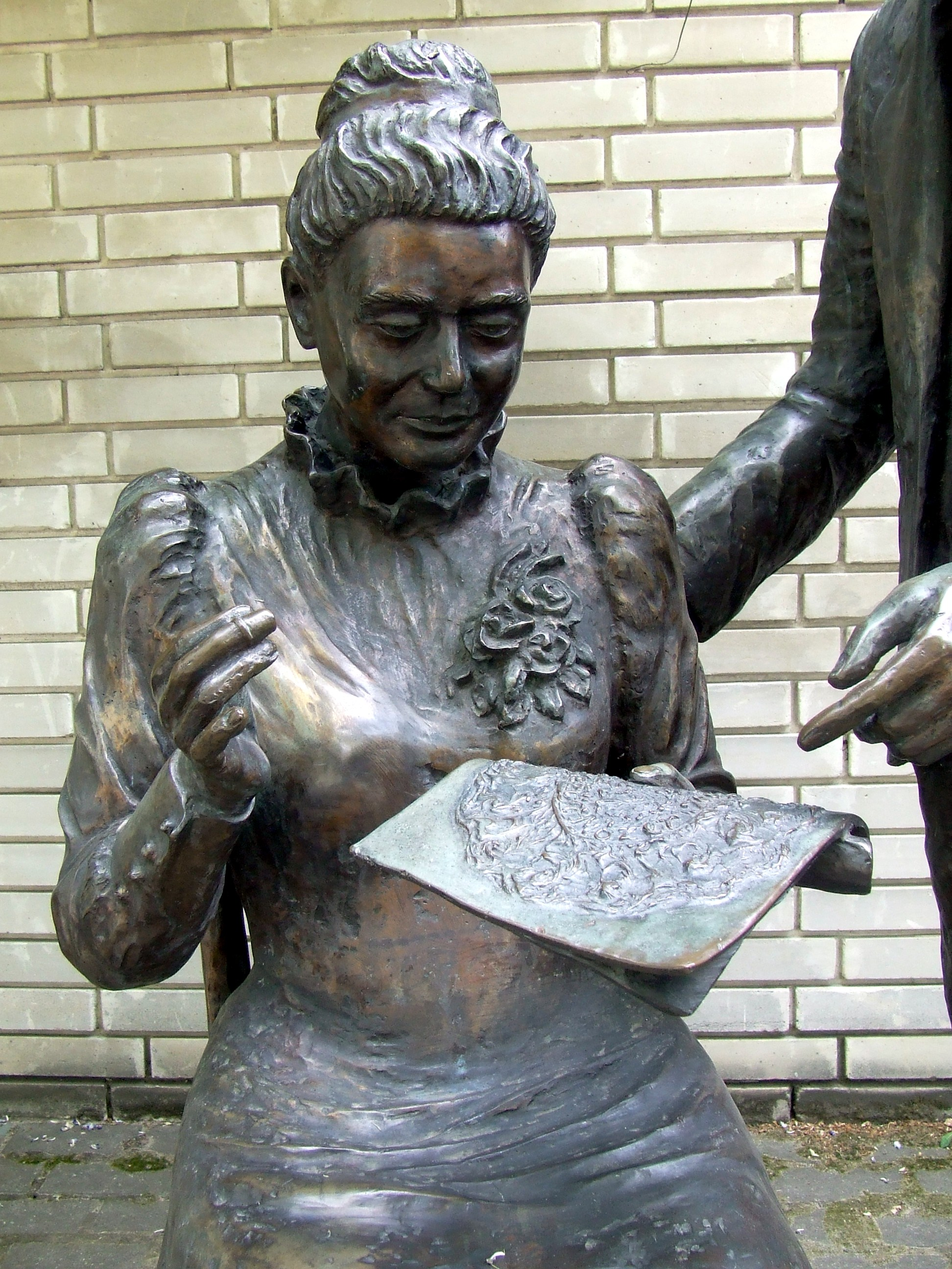 A Csipkevarrók című szobor Kiskunhalason. (részlet)